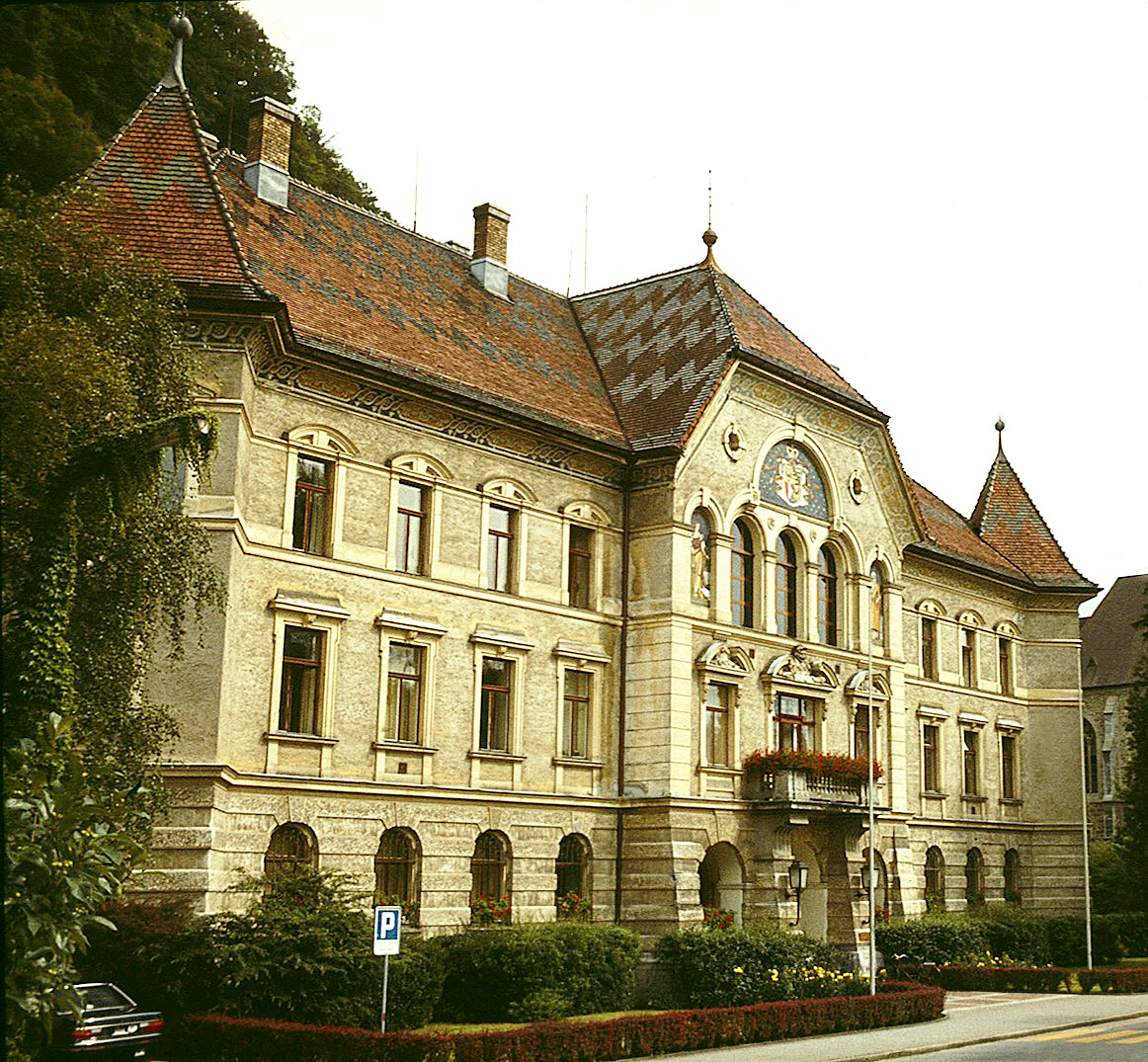 Regierungsgebäude (Government Building), Vaduz, Liechtenstein - Seat of Government and Parliament.